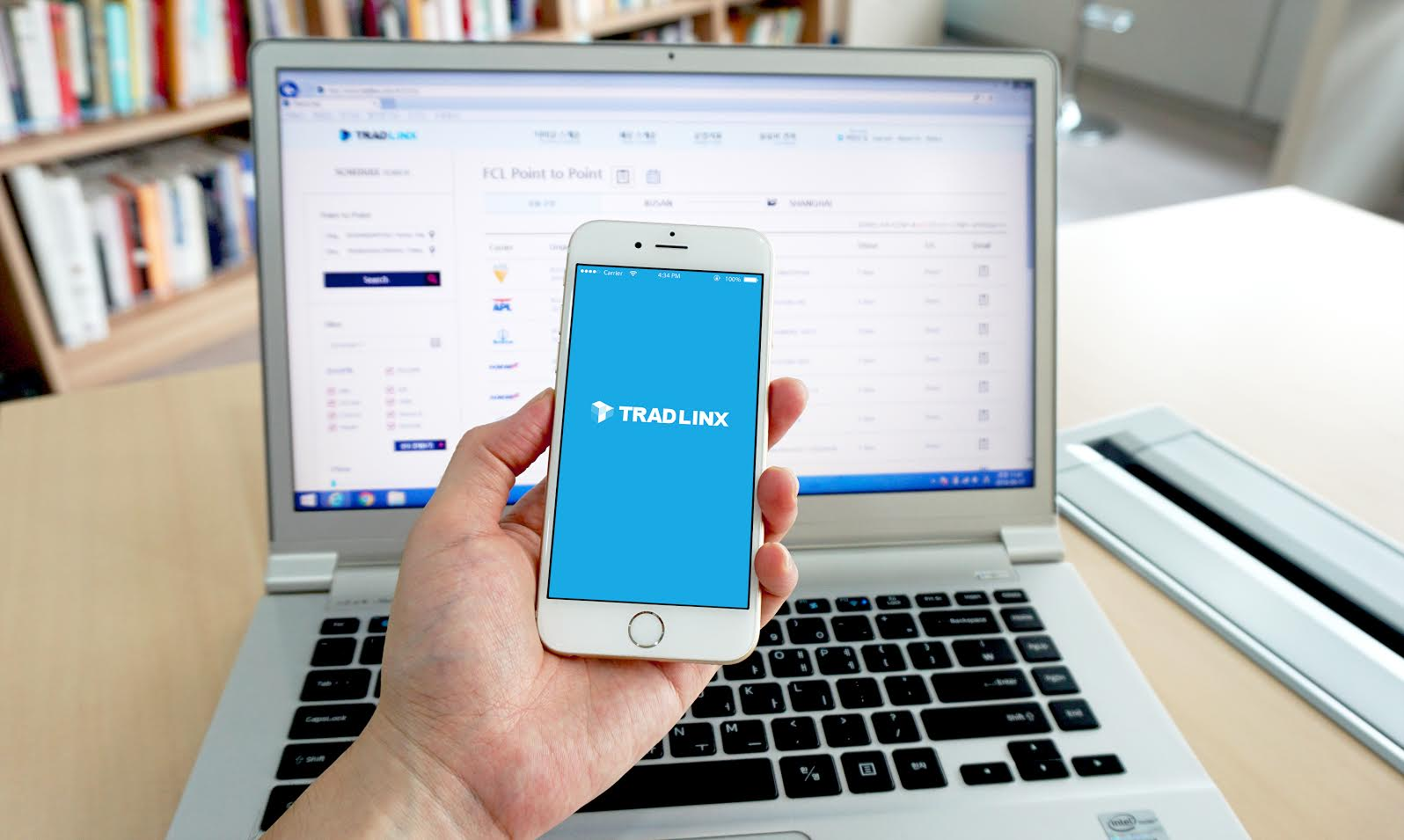 트레드링스